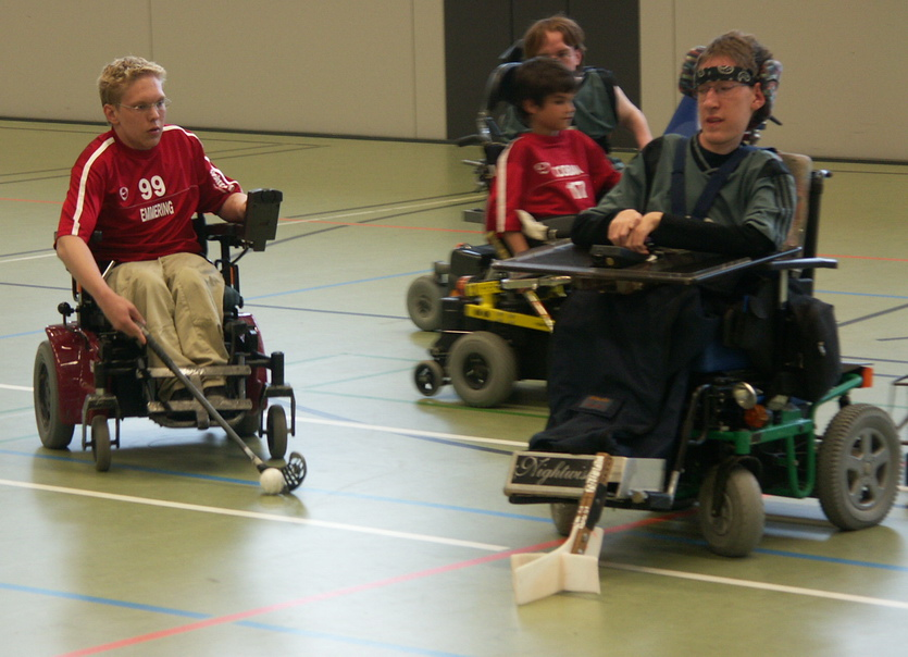 Szene aus dem Zweitliga-Spiel Rolli-Teufel Ludwigshafen gegen Ballbusters Würzburg (29.04.06)